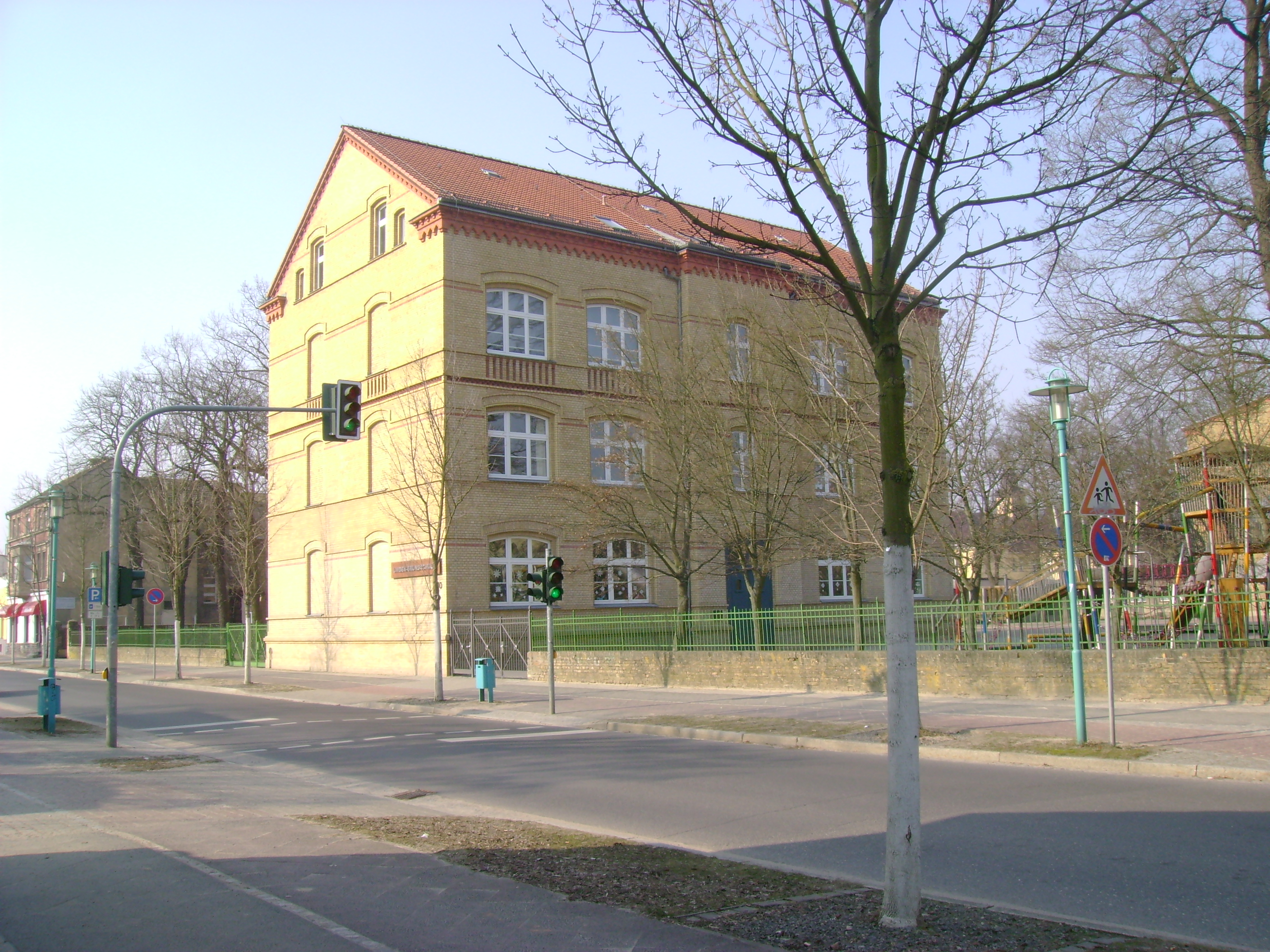 Linden-Grundschule in Velten Viktoriastraße 10. Das Gebäude wurde 1885 erbaut und seitdem durchgehend als Schule genutzt.